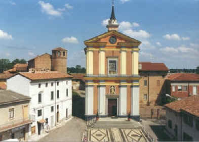 Facciata della chiesa di S.Maria Assunta in Calendasco con sul fianco il castello ove è nato san Corrado Confalonieri nel 1290. Foto di mia proprietà. Usabile senza problemi.